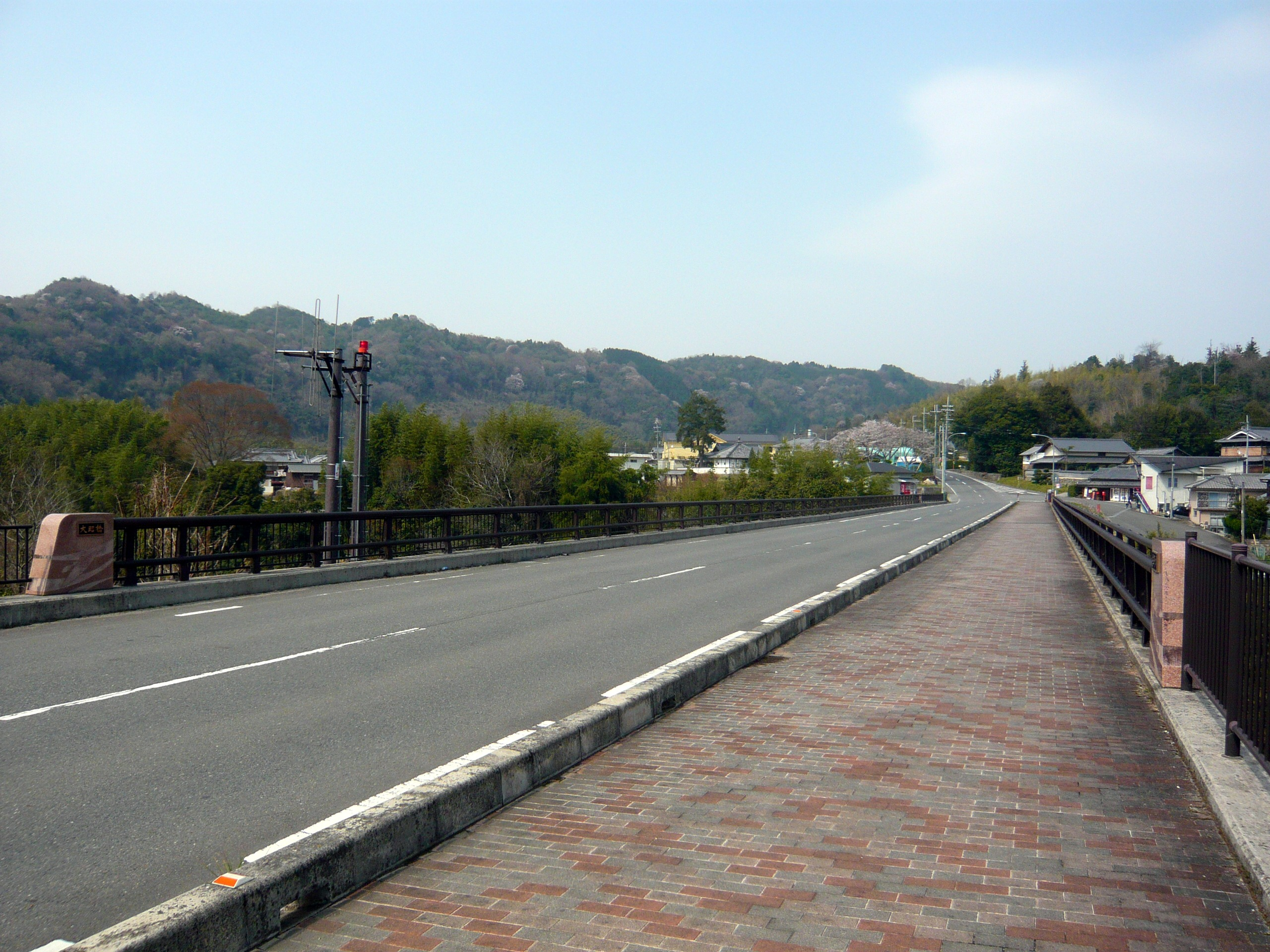 大昭橋 2011.4.11